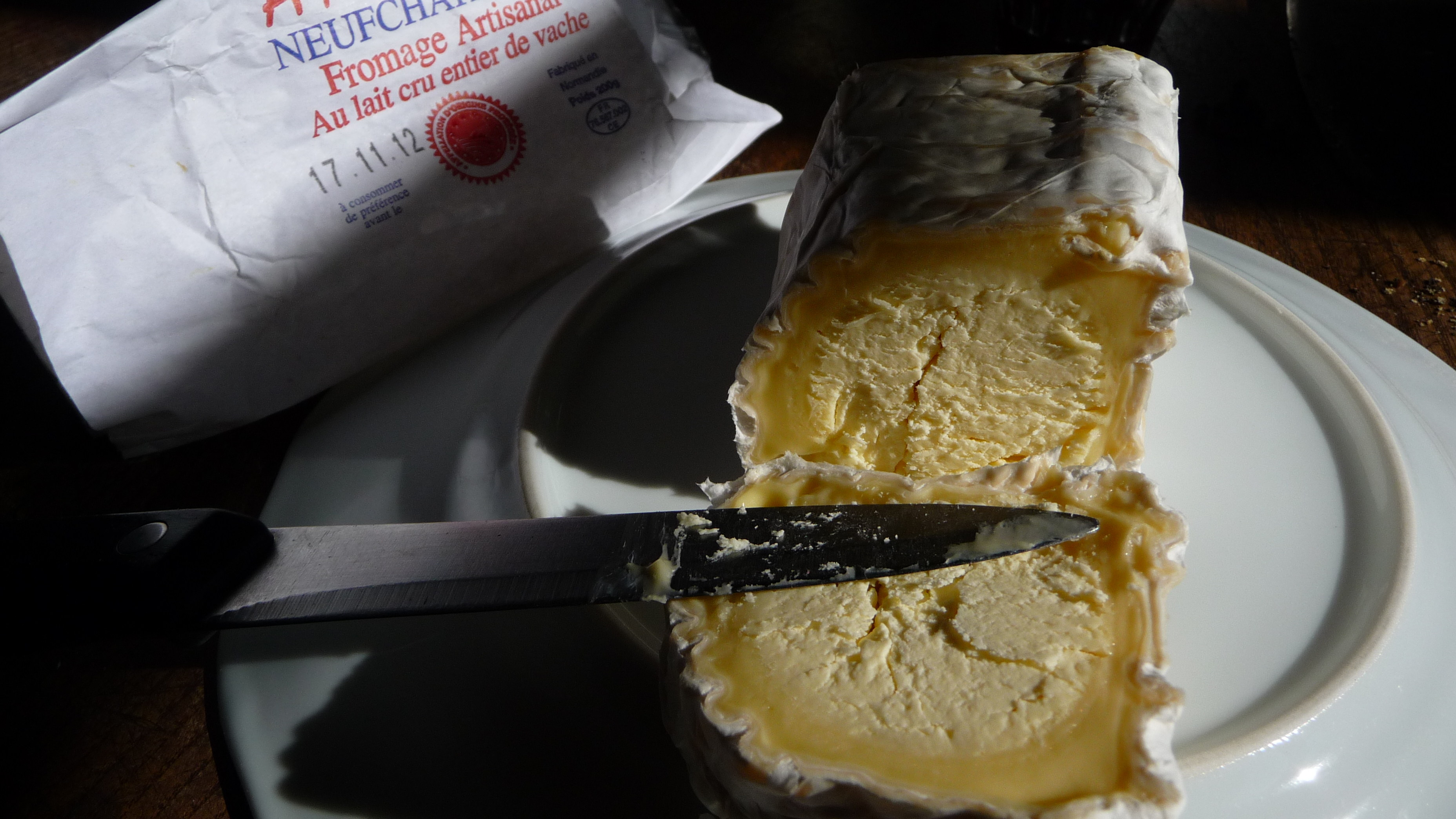 Fromage appelé Neufchâtel, laitier, au lait cru de vache.